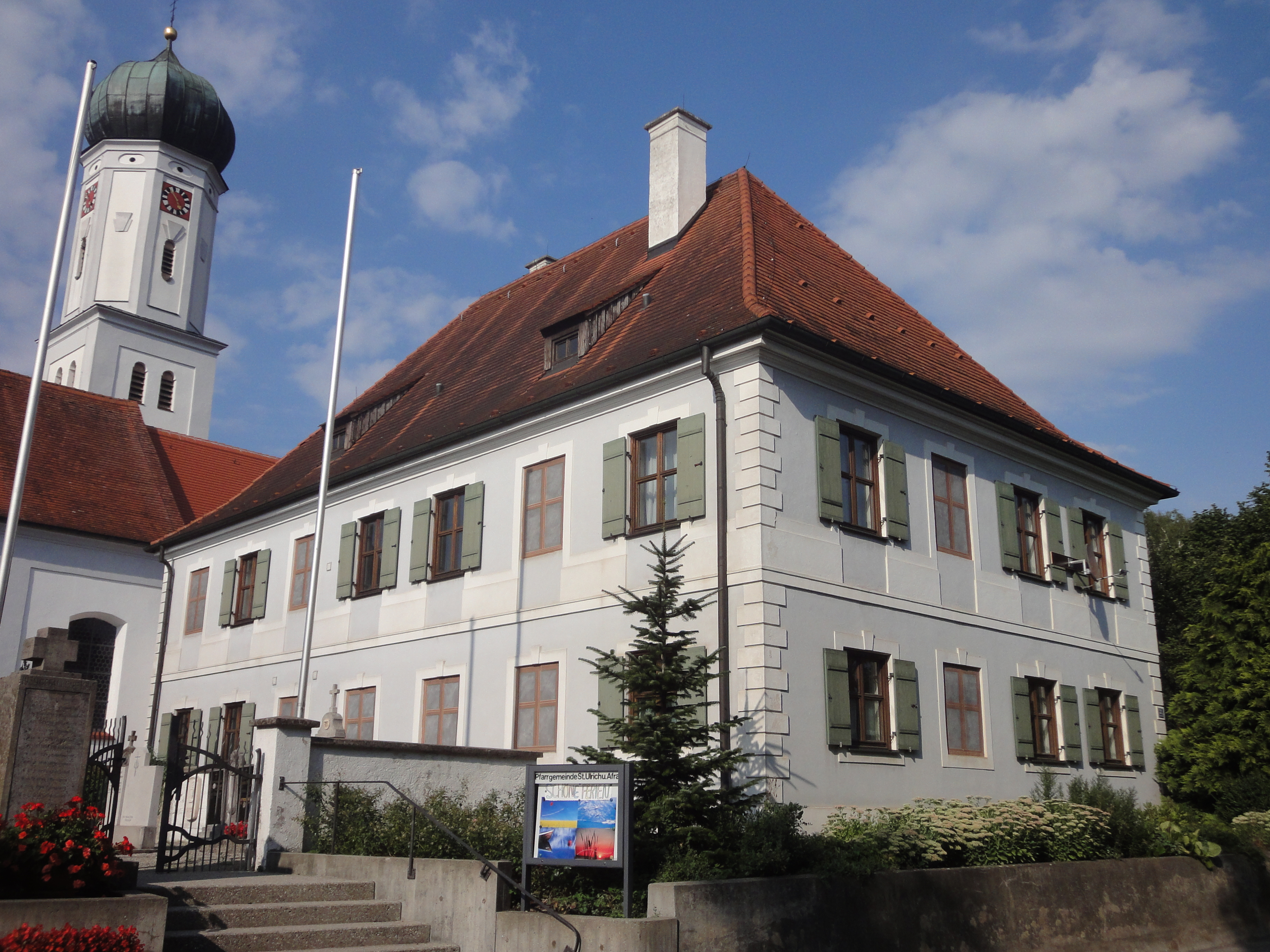 zweigeschossiger Walmdachbau mit Putzdekor, 1756/58, Todtenweis, vor Pfarrkirche